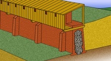 Detail der Verteidigungsanlagen auf der Schleswiger Landenge.